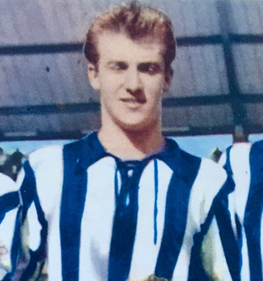 Owe Ohlsson con el IFK Göteborg en 1958